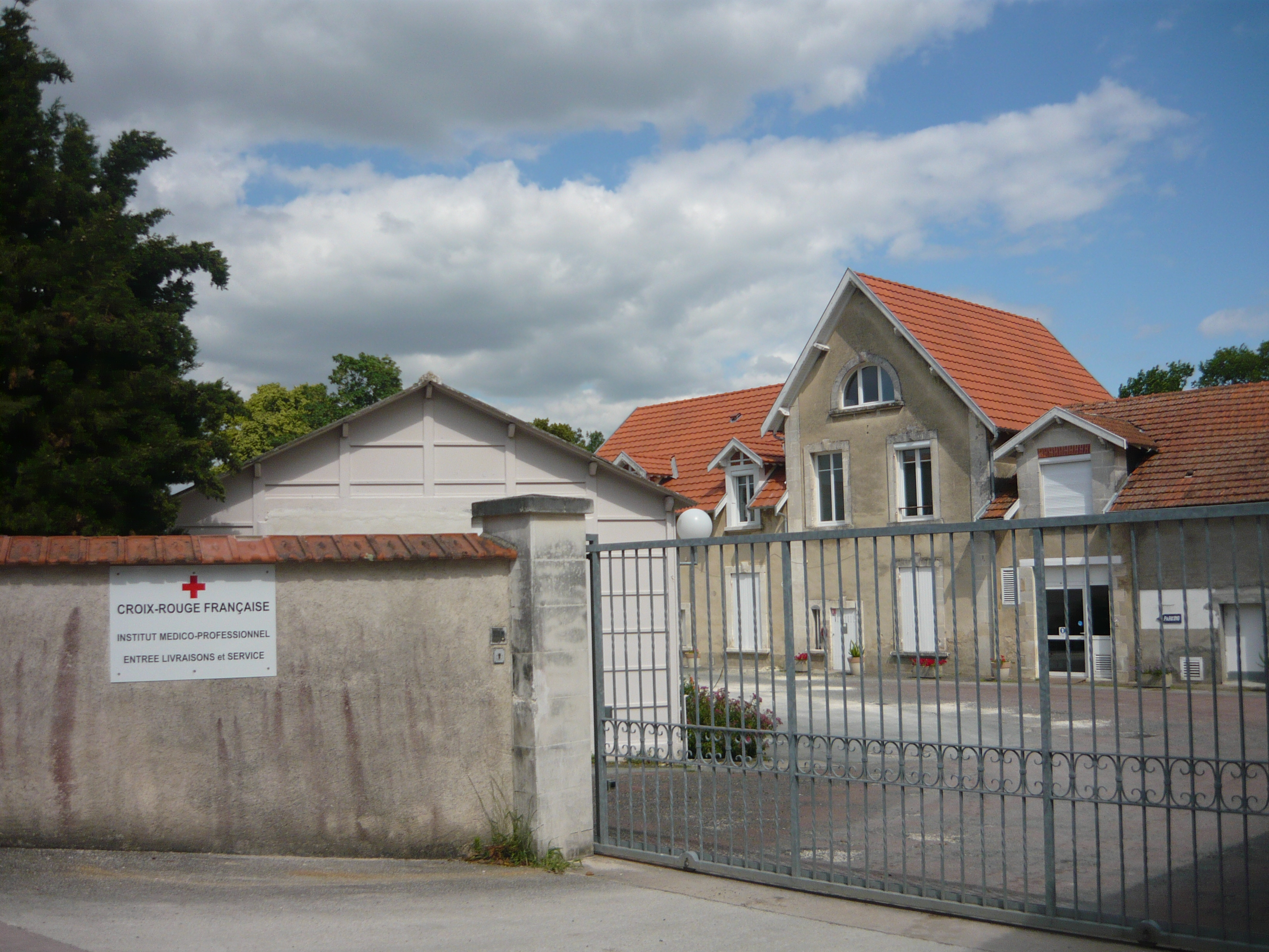 Vue sur les bâtiments de la Croix-Rouge à Tonnay-Charente.